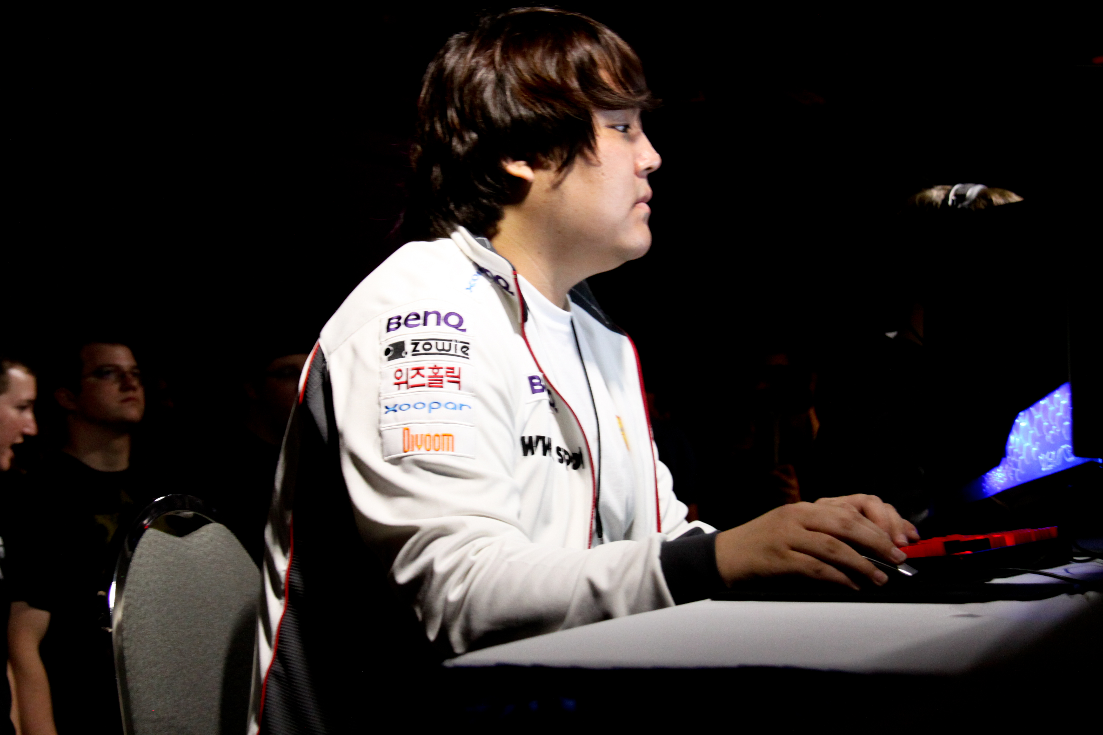 JulyZerg